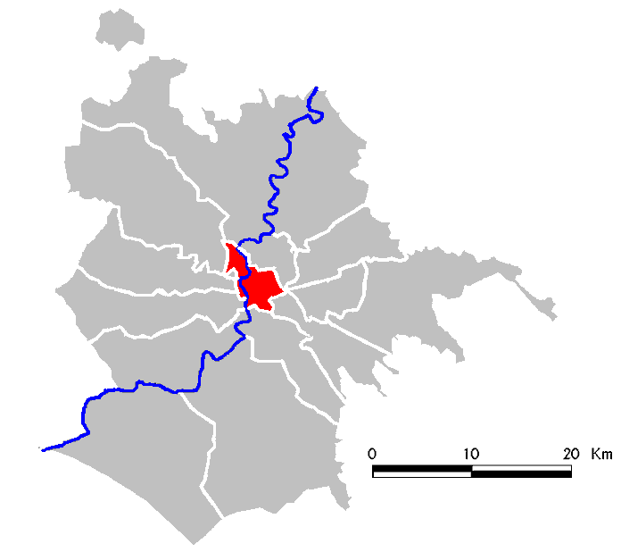 Municipio Roma I